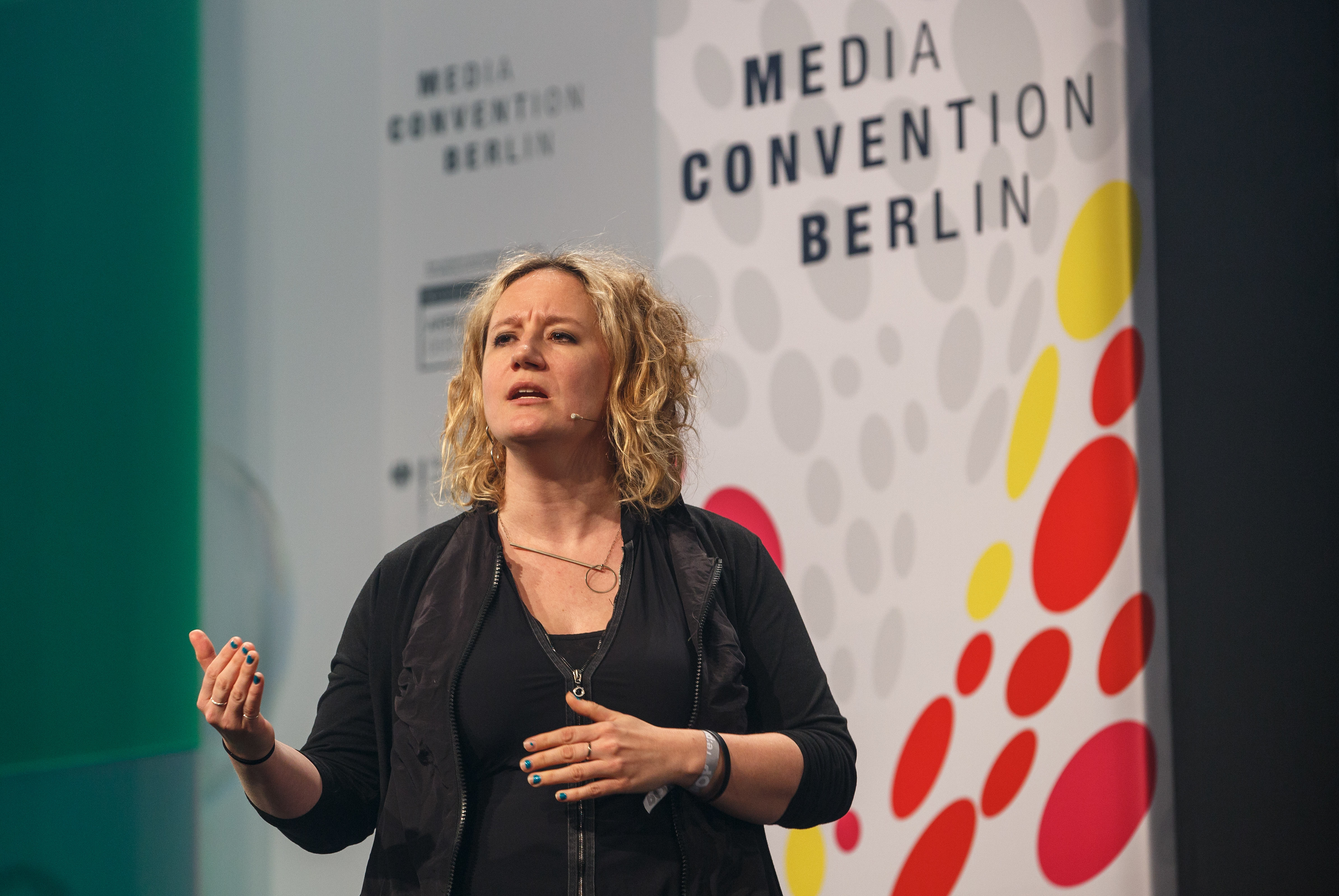 02.05.2018, Berlin: Talk: Opening Keynote: How an algorithmic world can be undermined. Speaker: Danah Boyd. Die re:publica ist eine der weltweit wichtigsten Konferenzen zu den Themen der digitalen Gesellschaft und findet in diesem Jahr vom 02. bis 04. Mai in der STATION-Berlin statt. Foto: Jan Zappner/re:publica